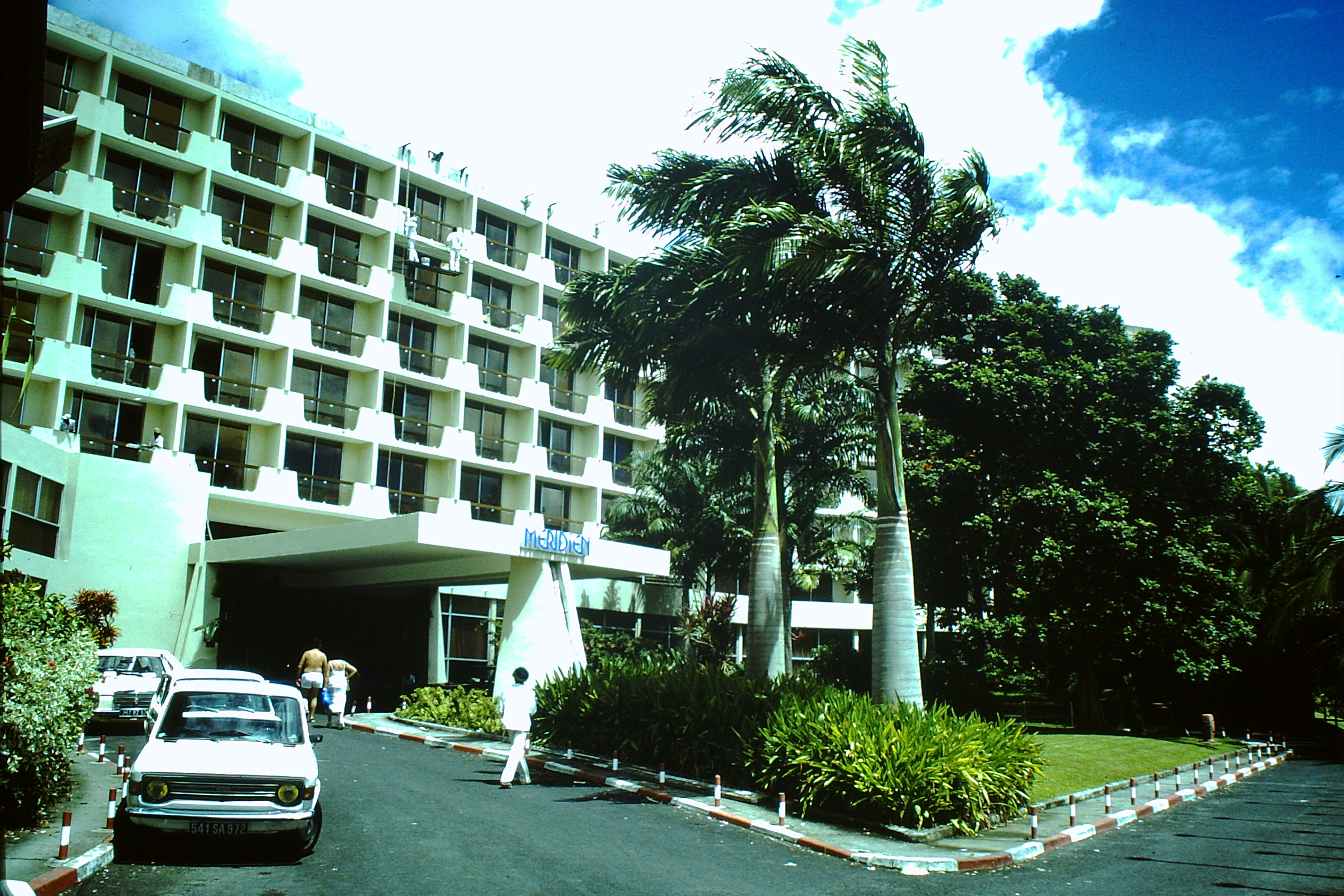 ex-Hôtel Méridien, ex-hôtel Kalenda, Pointe du Bout, Les Trois-Îlets, Martinique. Photo tirée du Fonds Brumter (XXX-1979-1) - Légende sur les diapo : "Guad/Mart 79"